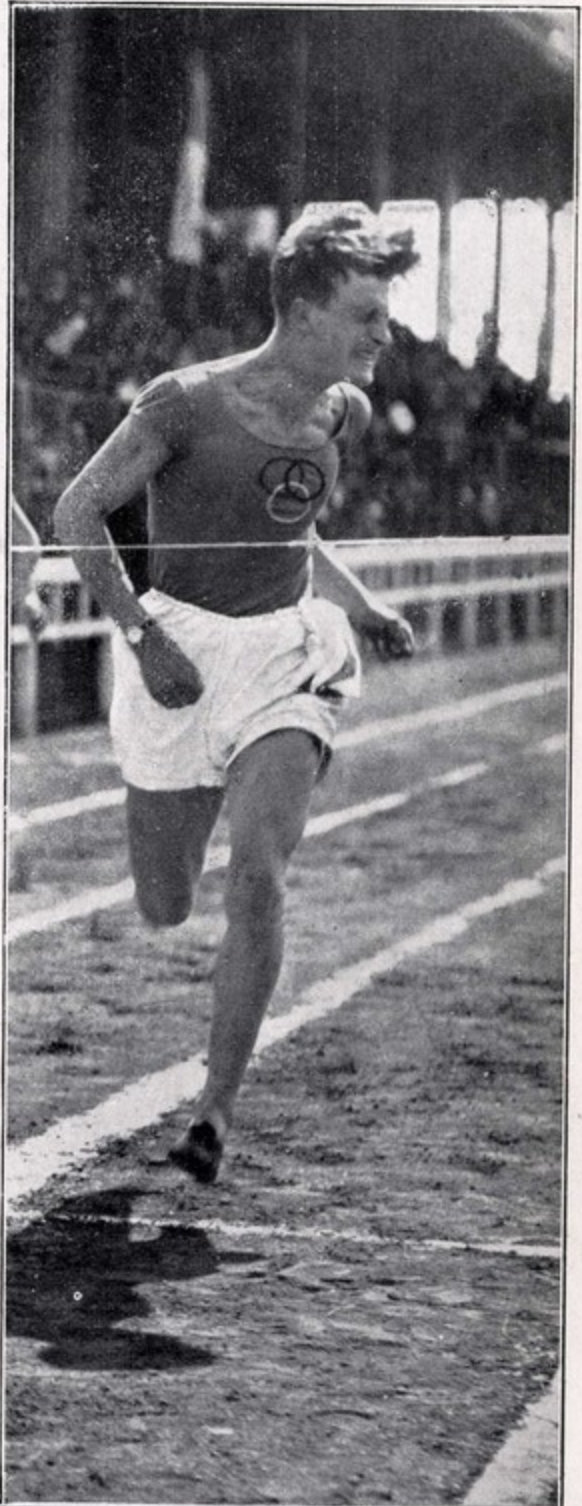 Edgardo Toetti al traguardo dei 100 metri nel 1928.